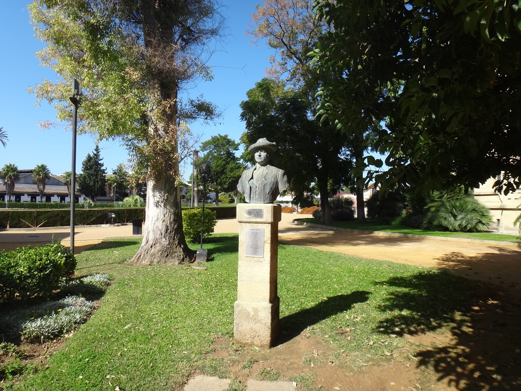 Real Escuela Andaluza del Arte Ecuestre. Jerez de la Frontera (Andalucía, España)